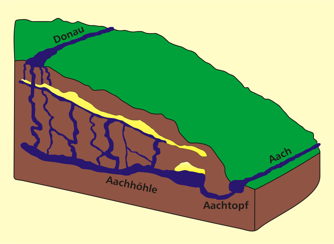 Grafik Donauversickerung